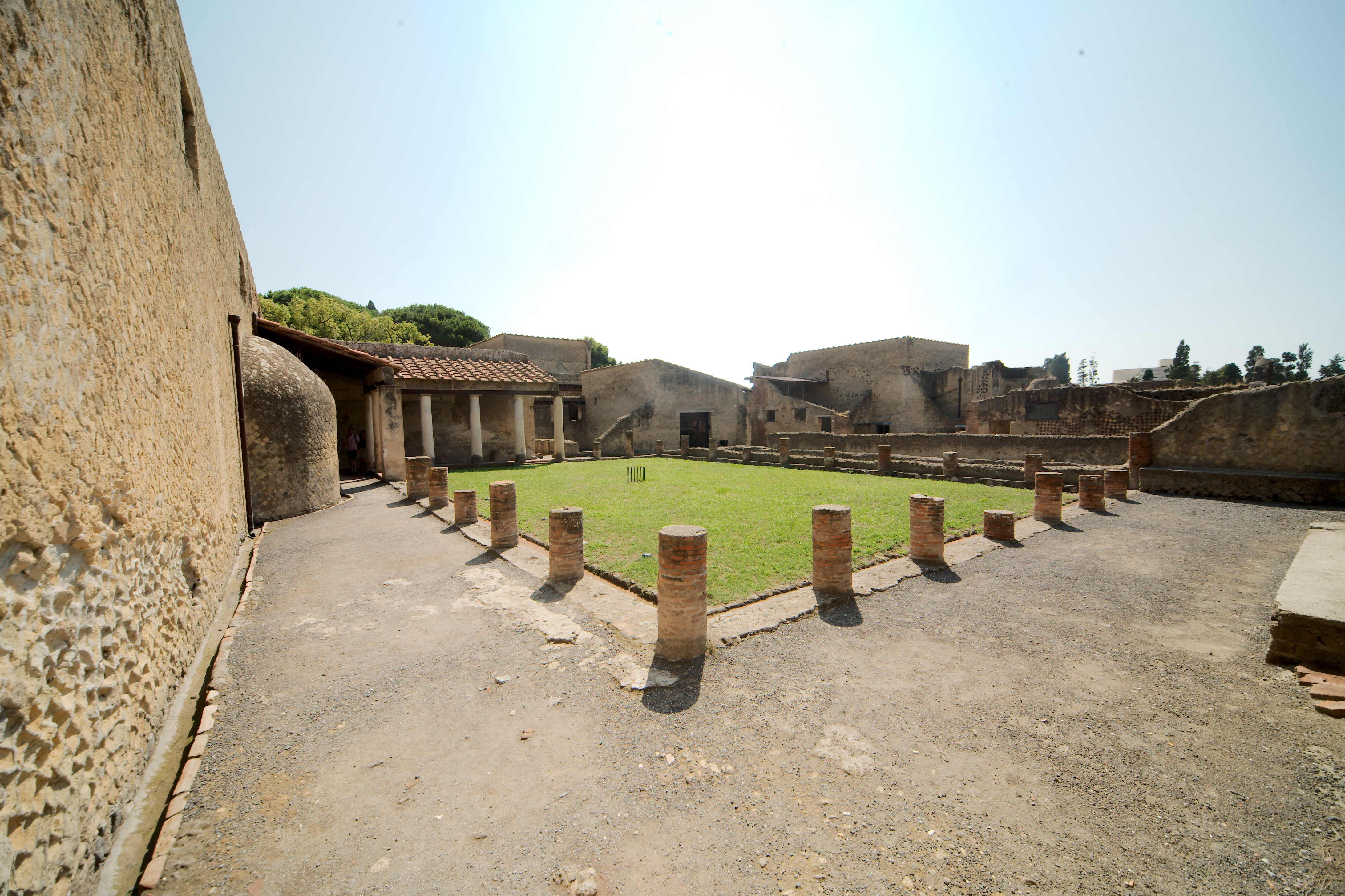 Terme machili (Herculaneum)